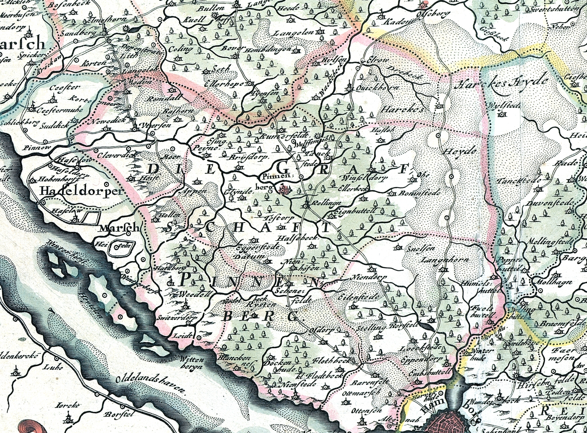 Die Grafschaft Pinneberg, Ausschnitt aus der "Landtcarte von dem Fürstenthumbe Stormarn Anno 1650" von Johannes Mejer (* 1606 Husum; † 1674 Husum) Landtcarte von dem Fürstenthumbe Stormarn Anno 1650